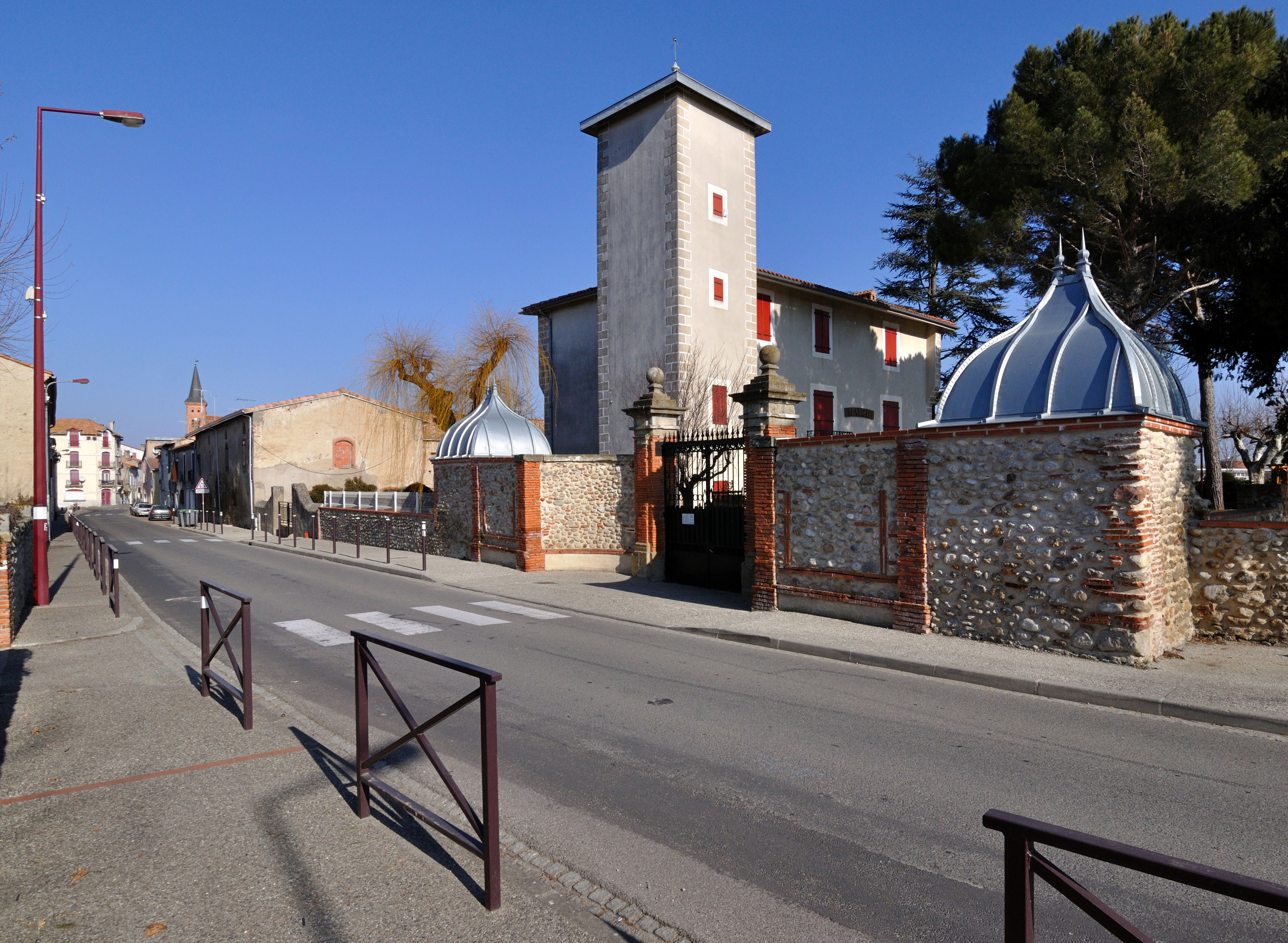 L'avenue du Pal à La-Tour-du-Crieu : la mairie, l'église.